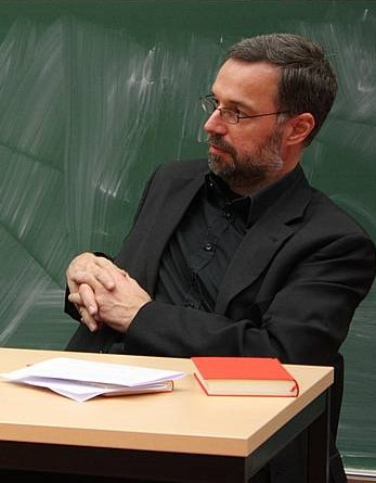 Prof. Dr. Norbert Otto Eke während einer Autorenlesung an der Universität Paderborn im November 2019.